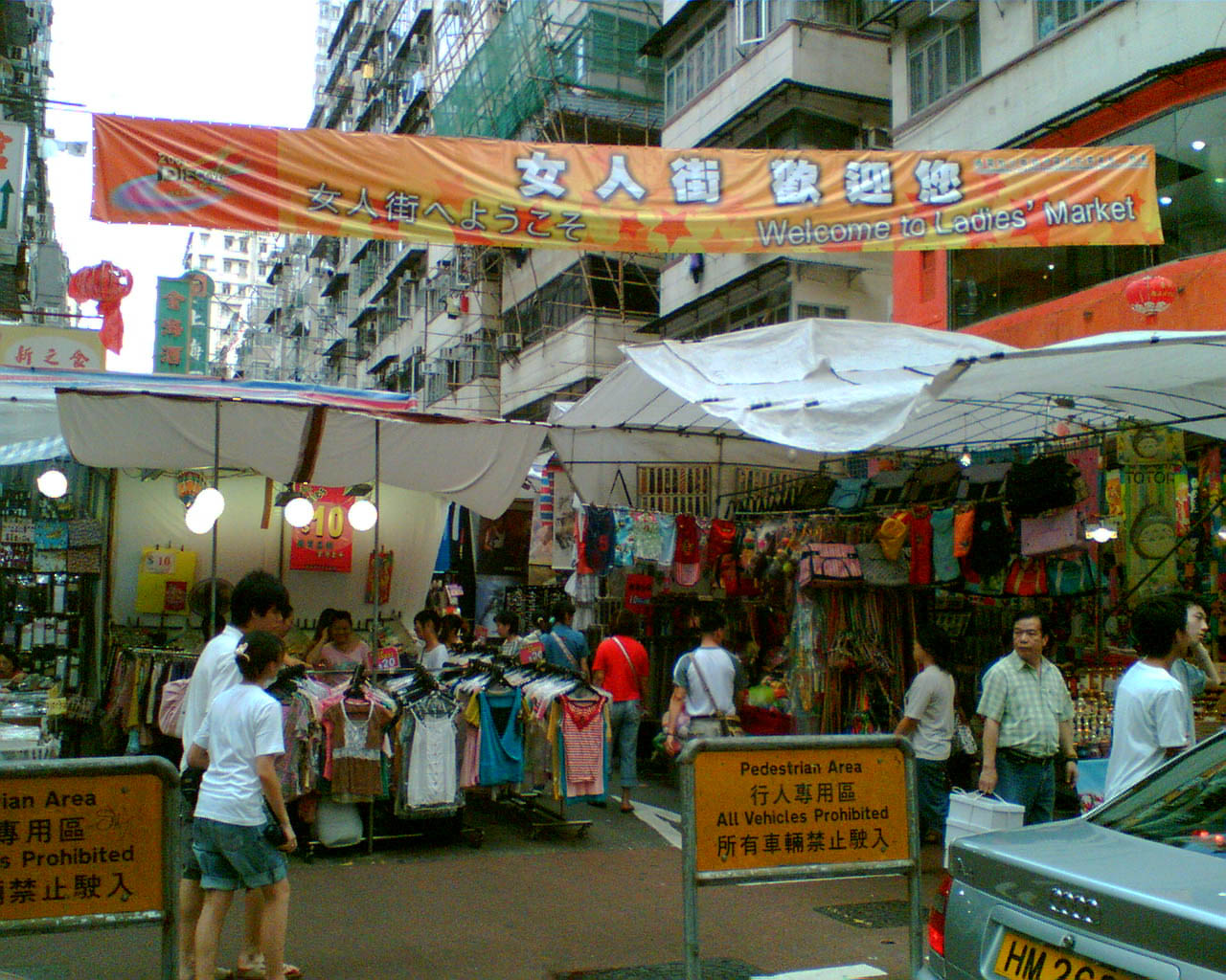 旺角女人街行人專用區